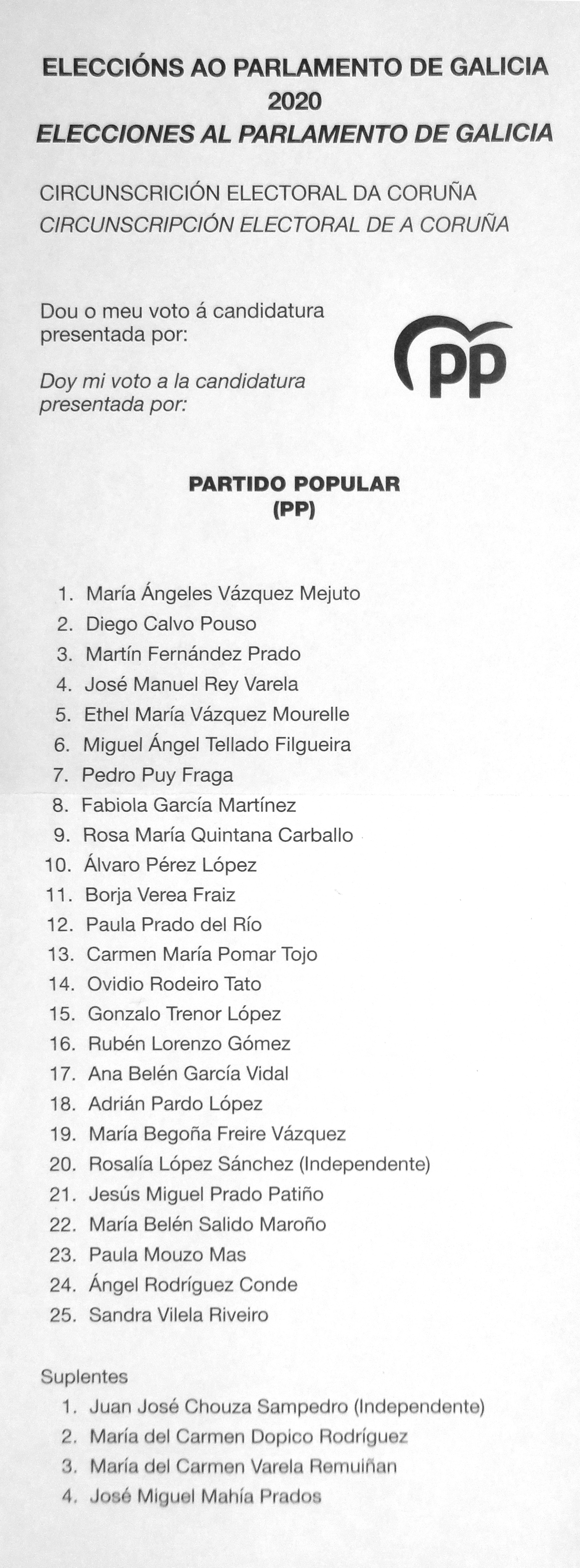 Papeletas electorais Eleccións ao Parlamento de Galicia 2020 circunscrición electoral da Coruña - xullo - PPdG